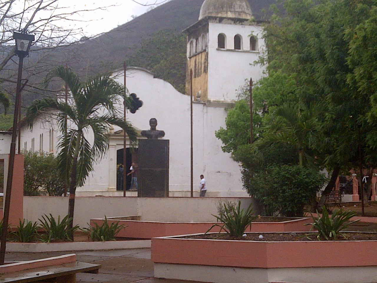 Plaza Bolívar de CURARIGUA